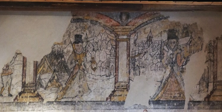 Wandgemälde im 2. OG des Vogtshauses in Steinen